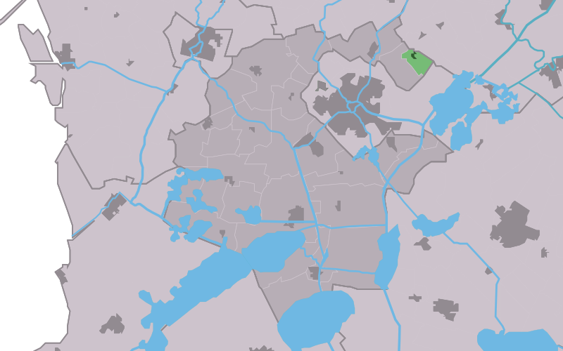 Kaartsje fan himrik fan Gau